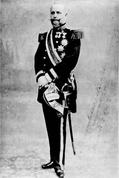 Augusto Leopoldo, segundo filho do Príncipe Luís Augusto de Saxe-Coburgo-Gota e da Princesa Leopoldina do Brasil